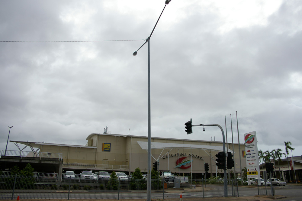 Casuarina Square. Casuarina, NT